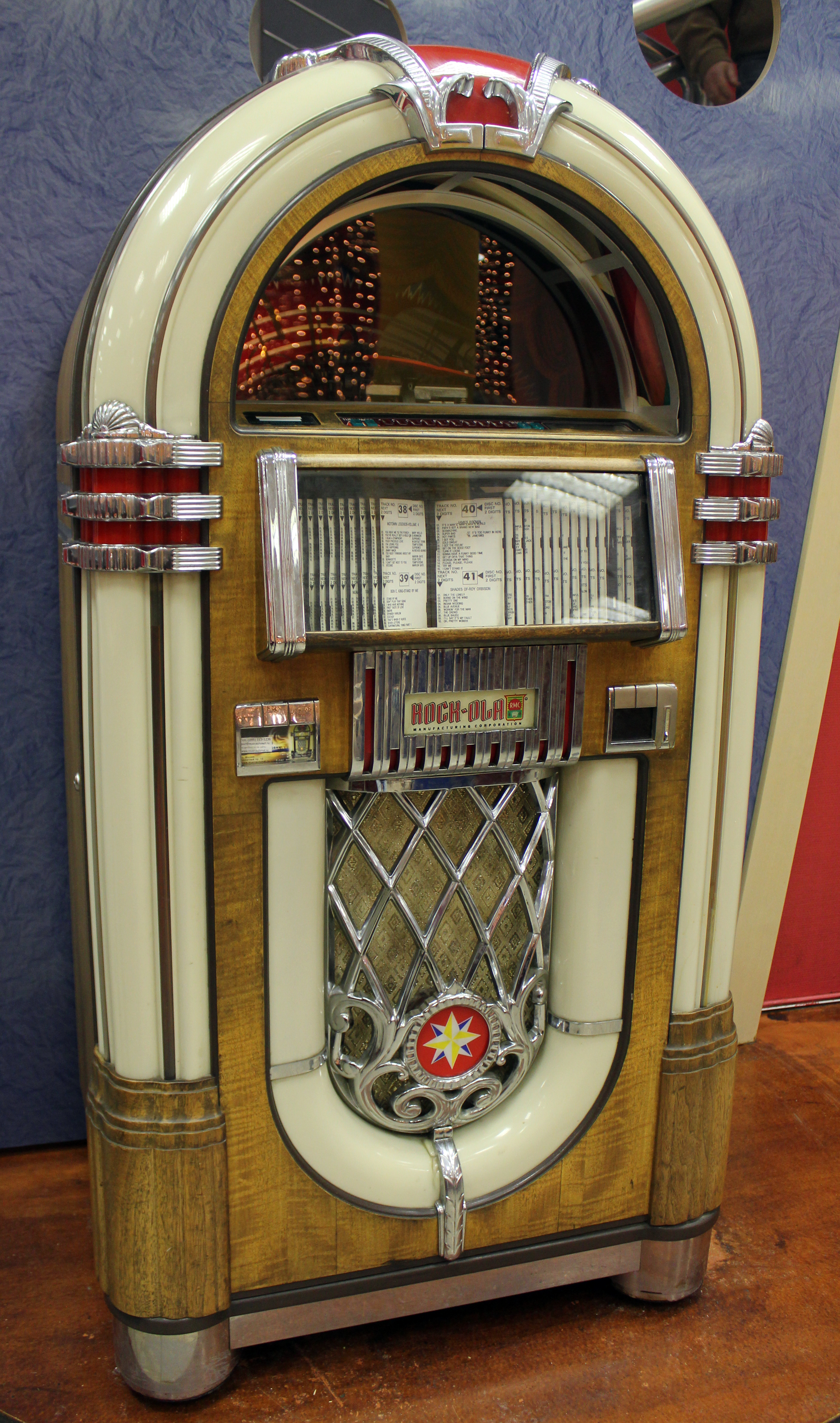 Музыкальный аппарат в МакДоналдсе в Москве